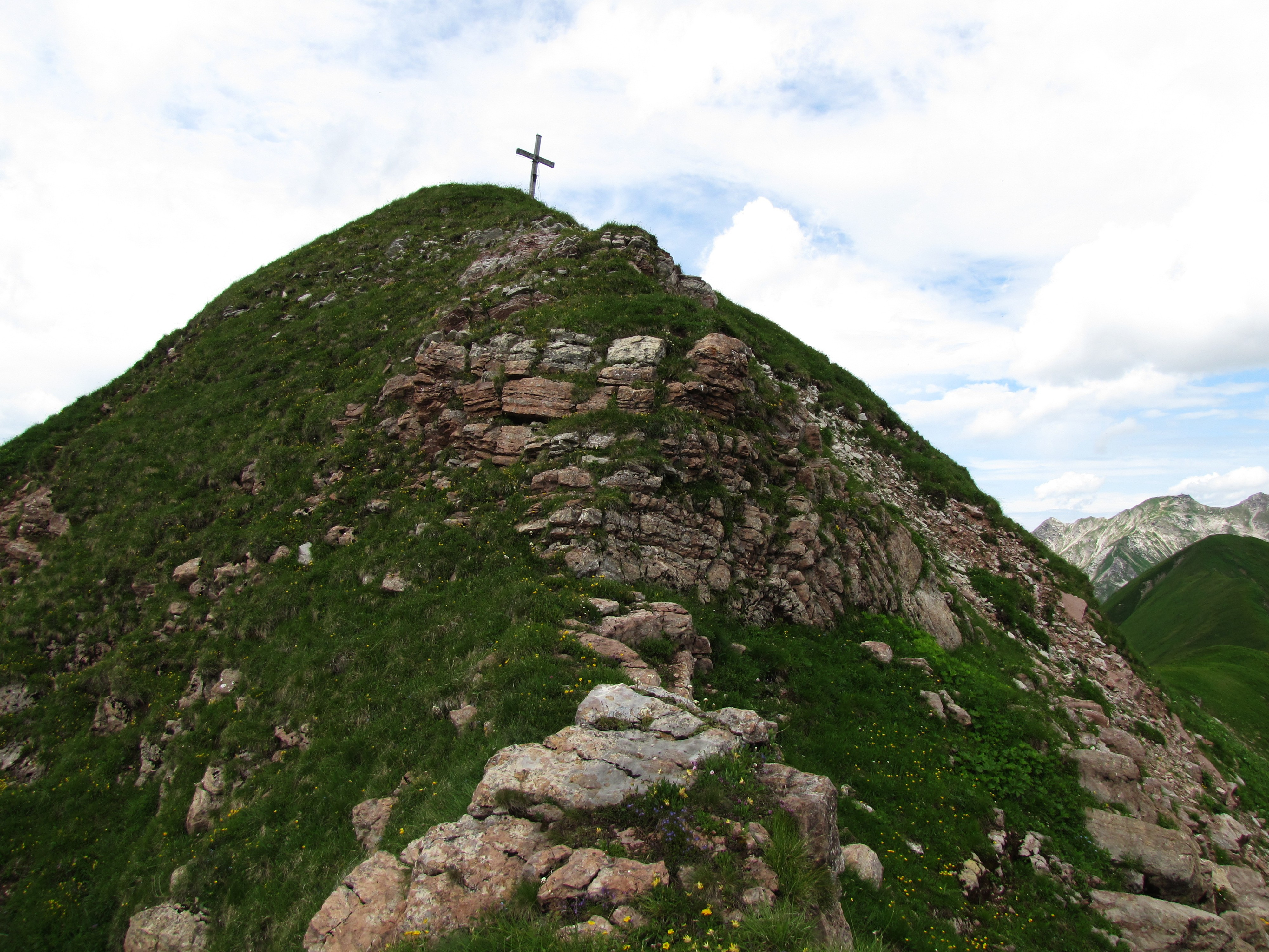 Gipfelaufbau des Schochen (2100 m) auf der Südseite.